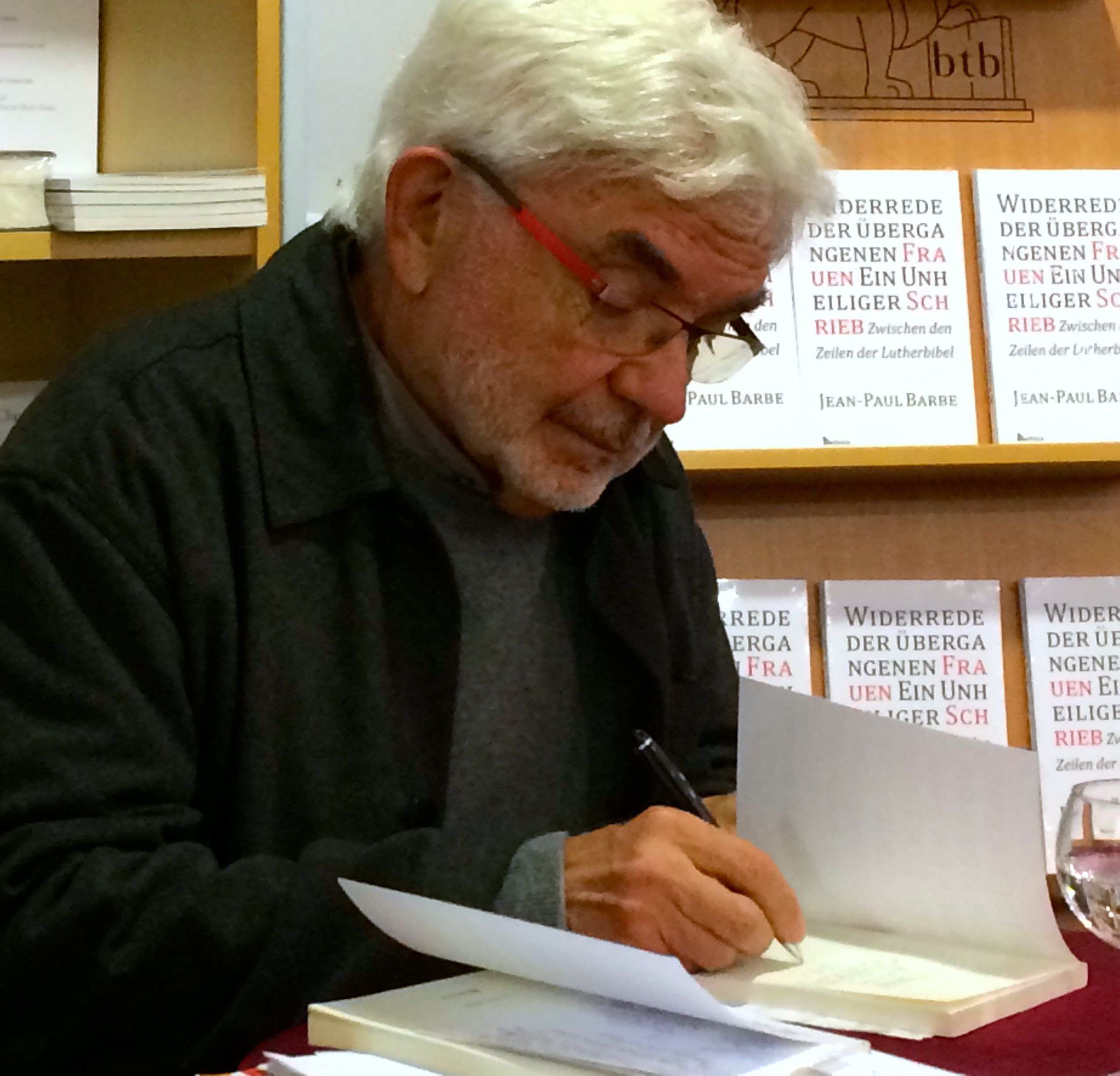 Lesung in der Heine-Buchhandlung Hamburg am 13.11.17